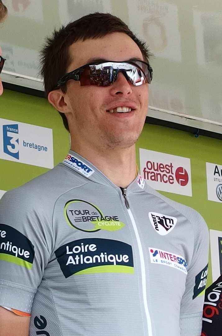 Tour de Bretagne 2014 - Présentation des équipes au départ de la sixième étape à Radenac - Équipe Sparebanken Sør Depicted person: Bjørn Tore Hoem